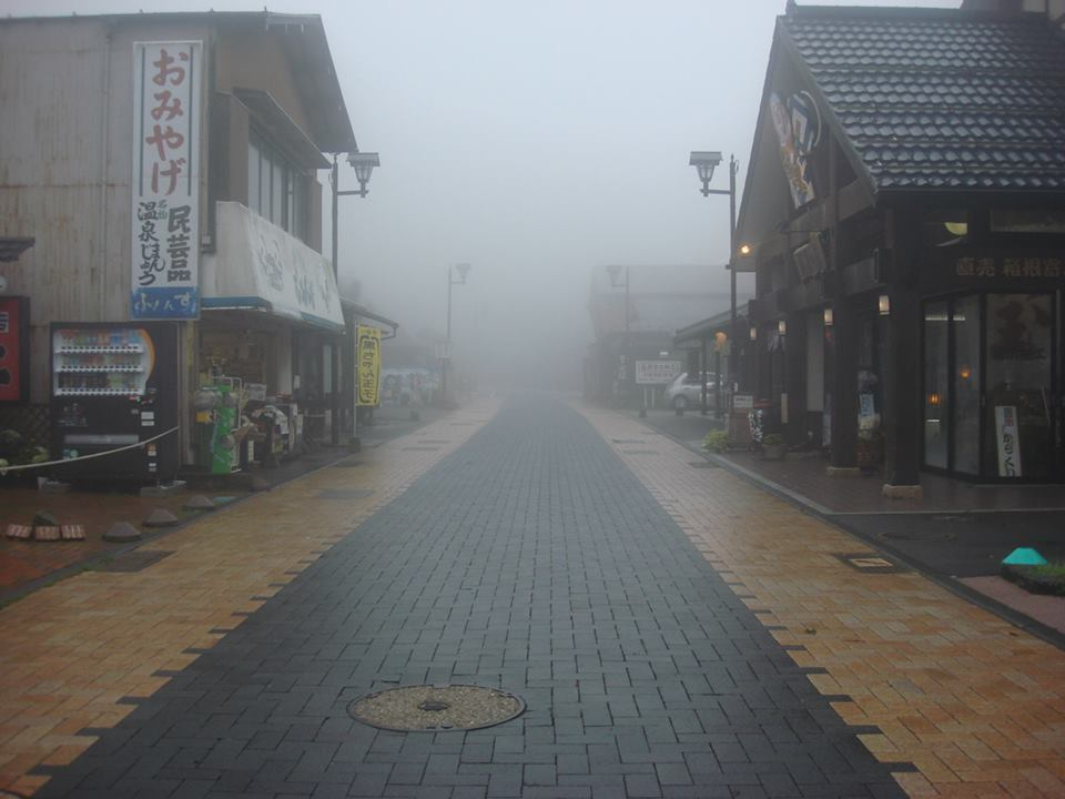 Foto hecha en Japón en un día de niebla con grandes ráfagas de viento. Época veraniega, mes de Julio.